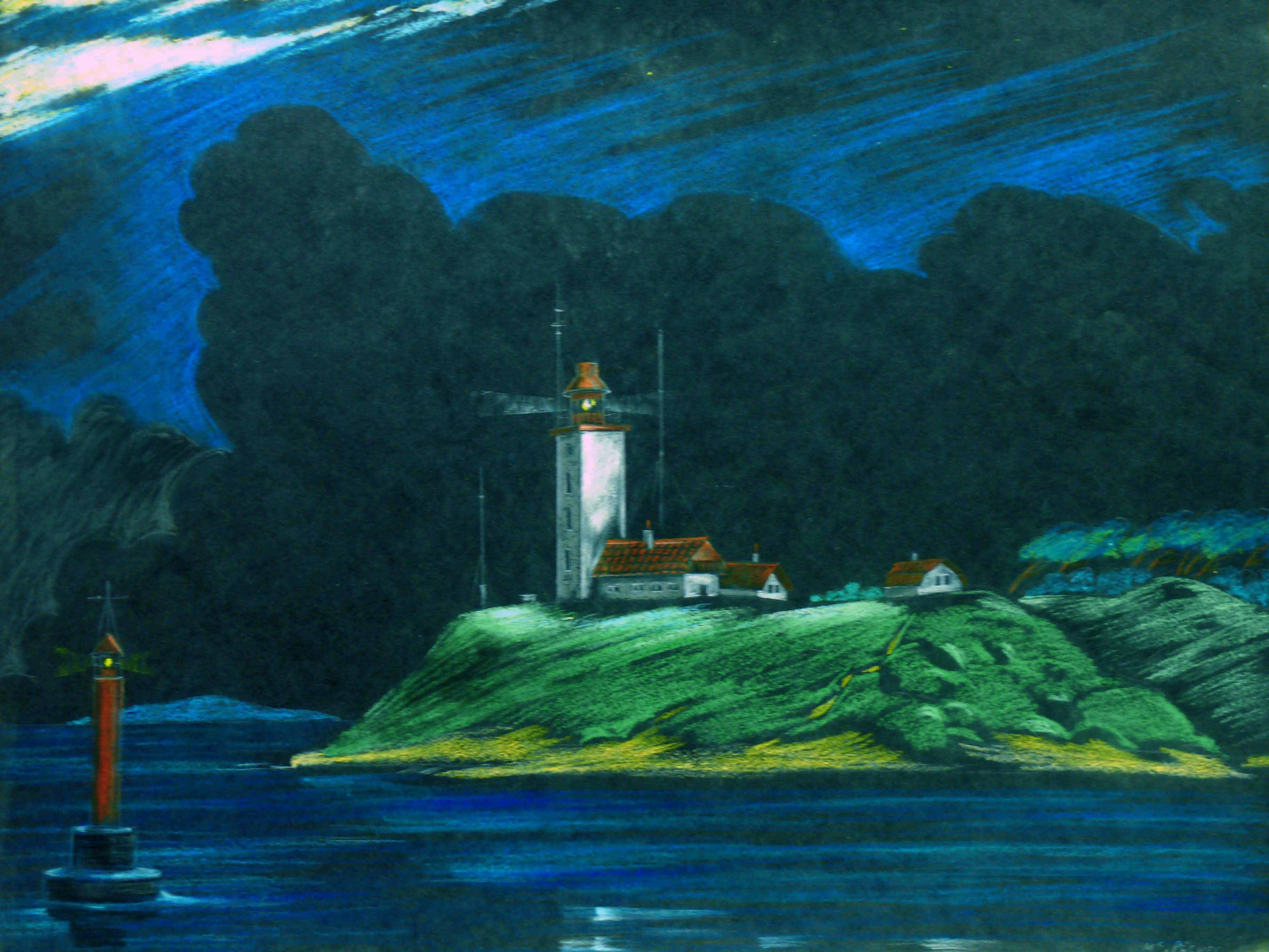 Картина «Маяк «Рёснес» (Røsnæs, Рёснес-Рев) на одноимённом мысе острове Зеландия, Дания, пролив Каттегат» Вячеслава Ивановича Овчинникова, год